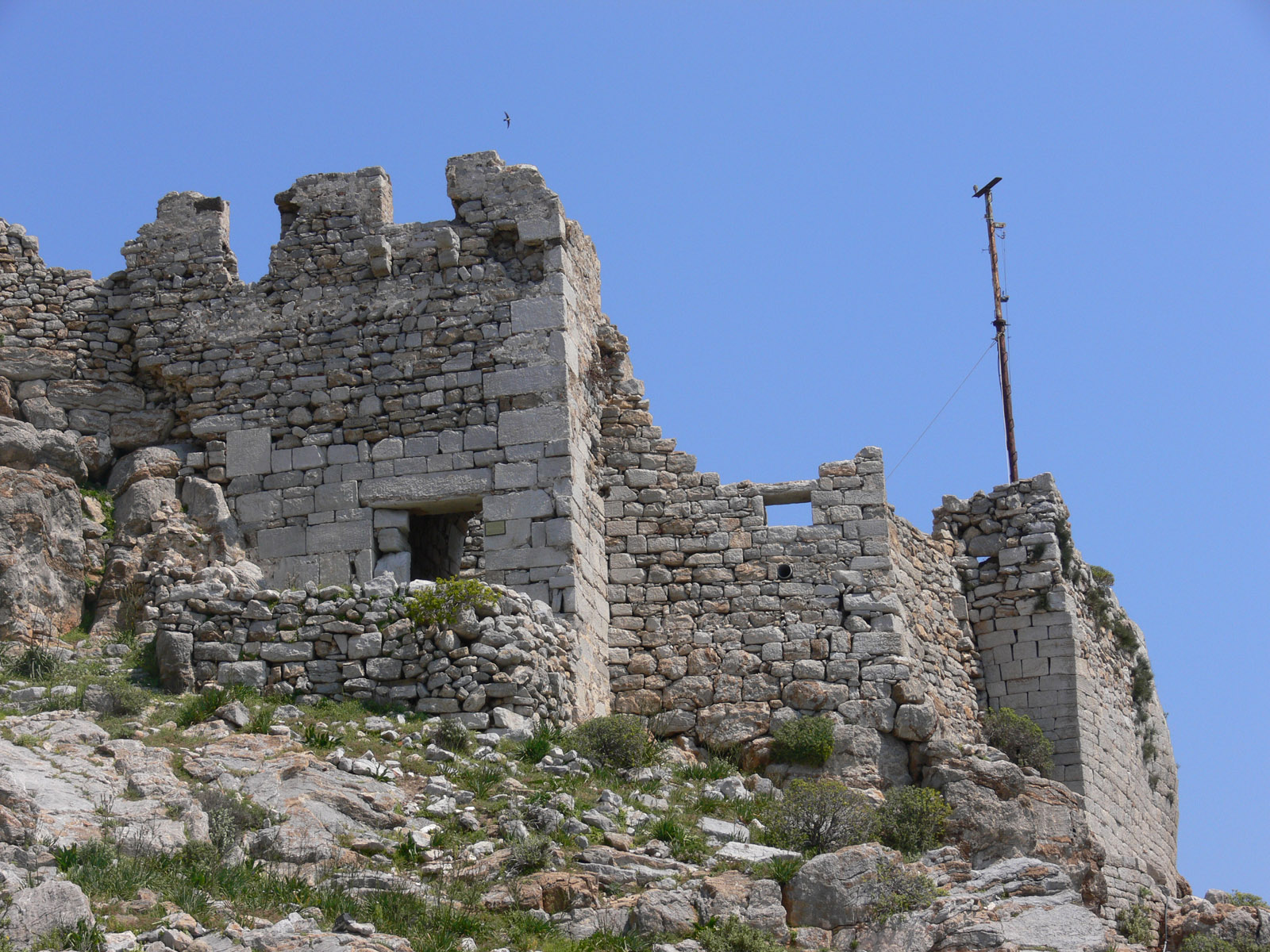 Eines von sieben Kastra auf Tilos.